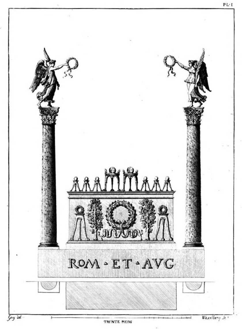 Pl. I. Reconstitution de l'Autel des Gaules selon les médailles romaines